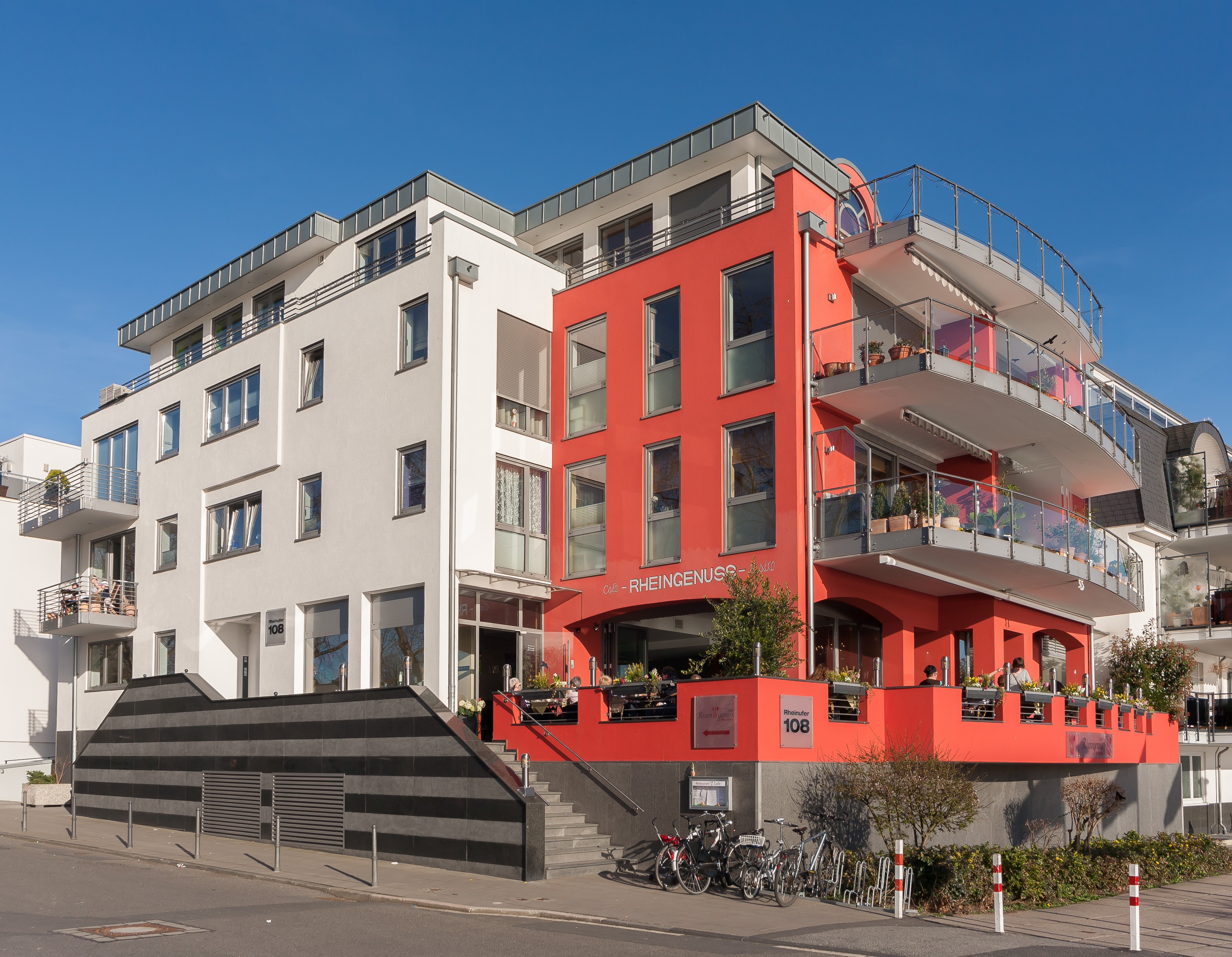 Nachfolgebau des „Hotels Rheineck“, Rheinufer 108 (Ecke Fährstraße), Niederdollendorf, Königswinter, Deutschland